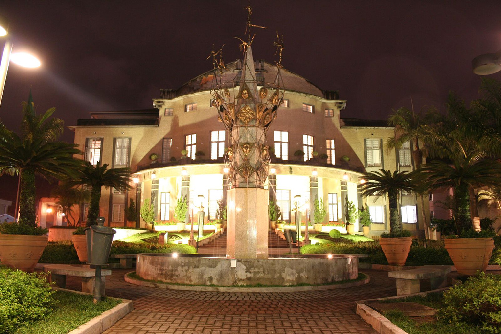 Vista da entrada do Teatro Carlos Gomes.